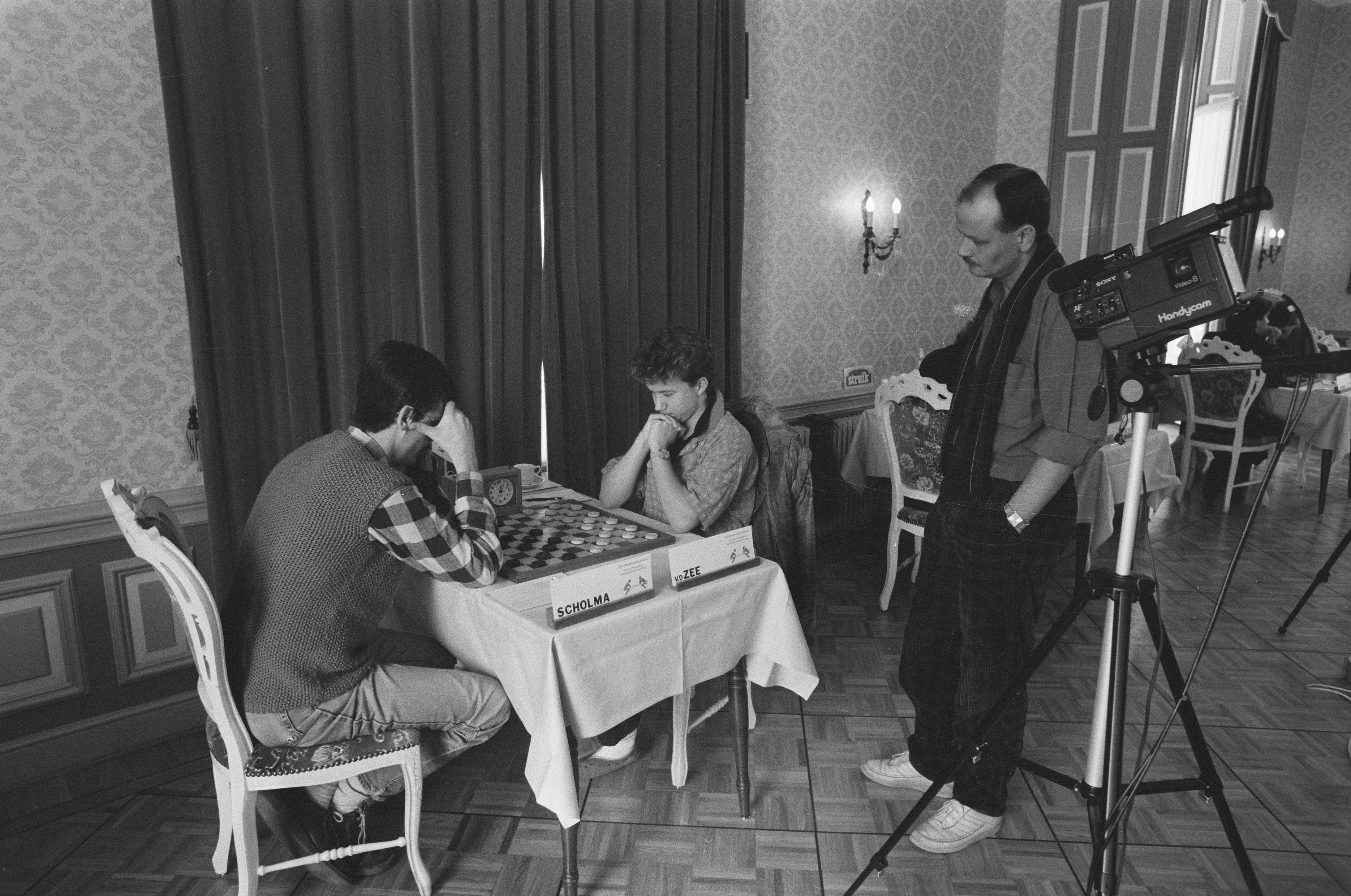 NK dammen in Putten; de achtervolgers van Sijbrands; v.l.n.r. Scholma, Van der Zee en Van Aalten